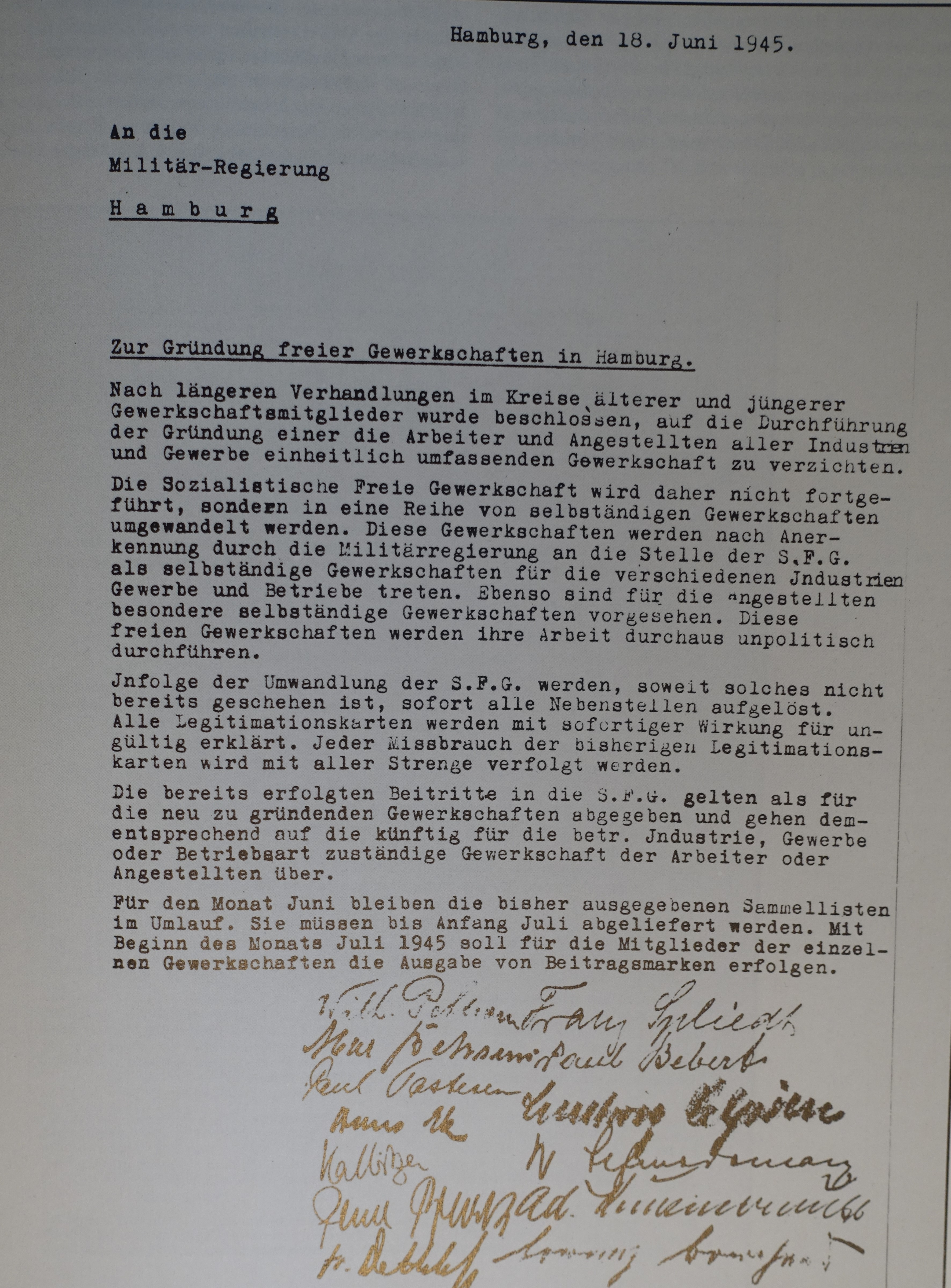 Schreiben zur Gründung freier Gewerkschaften in Hamburg und Auflösung der Sozialistischen Freien Gewerkschaft an die Militär-Regierung am 18.Juni 1945